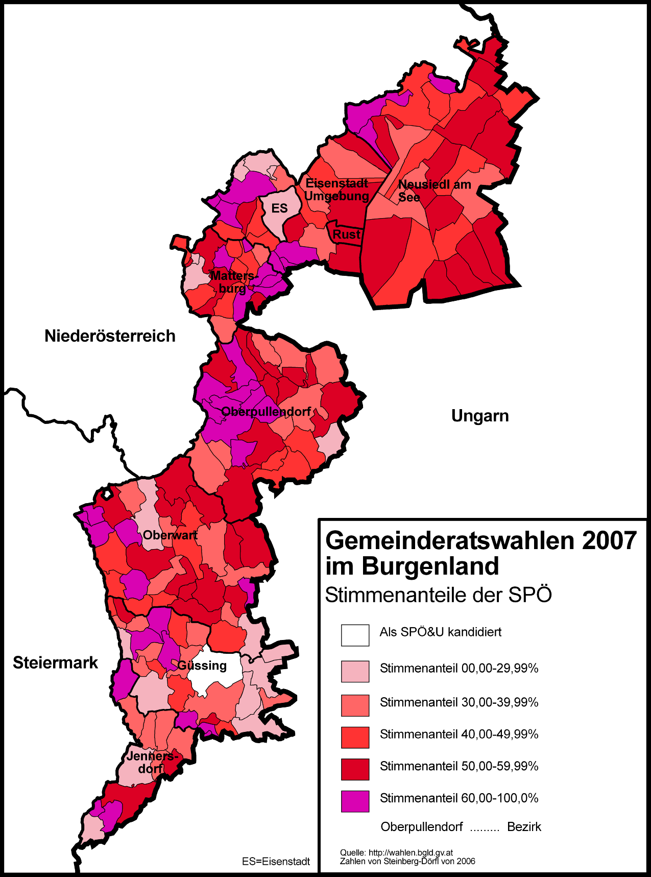 Stimmenanteile der SPÖ bei den Gemeinderatswahlen 2007 im Burgenland